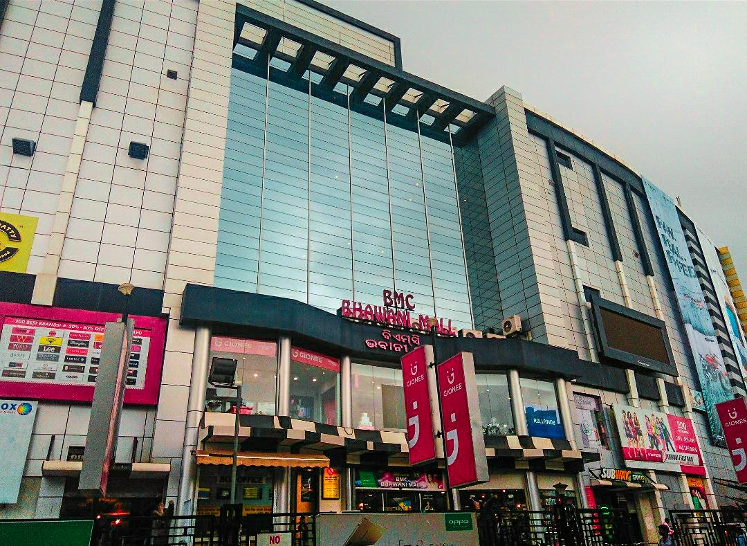 Bmc Bhawani Mall.jpg